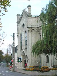 Synagoge Petrikau